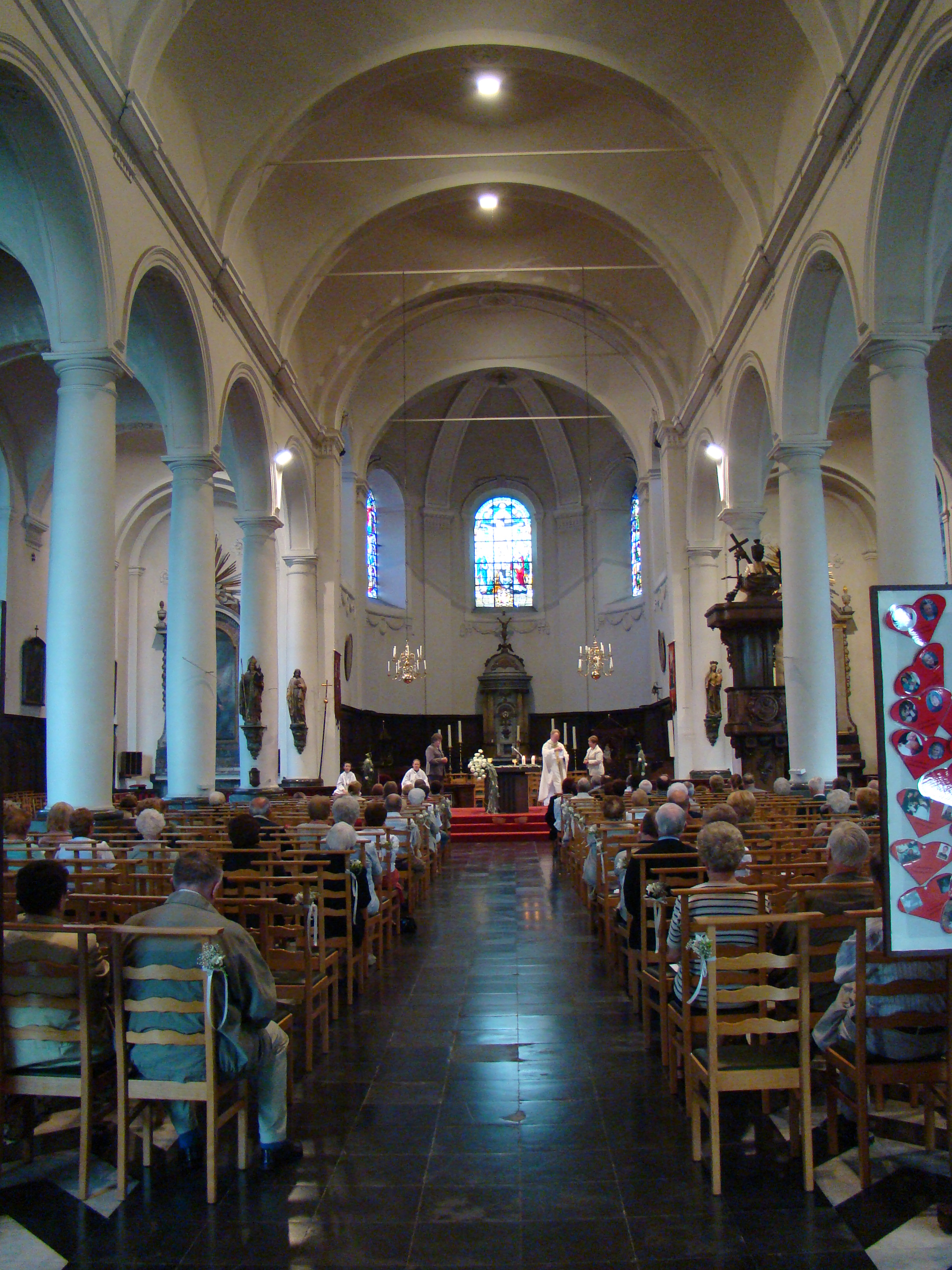 Sint-Amanduskerk in Ingelmunster Church of Saint Amandus Ingelmunster, West Flanders, Belgium